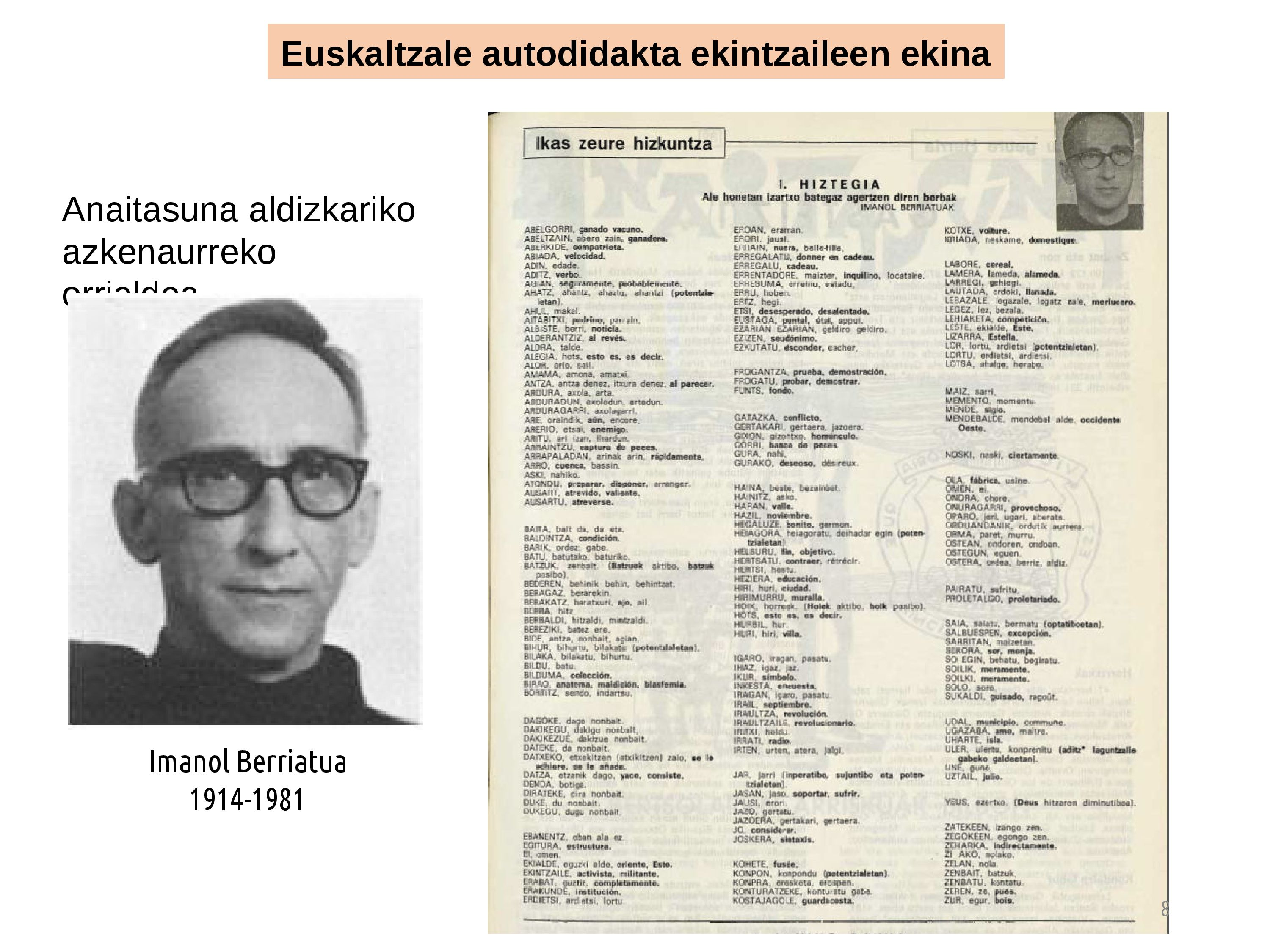 Imanol Berriatua. Euskara Batuaren helduaroa Jardunaldiaren barruan (Gasteiz, 2018-06-21). Jose Ramon Etxebarriak bere hitzaldian euskarazko testugintzan bere helburuak, lanak eta bidelagunak aipatu zituen (Euskarazko testugintza. Amaitu gabeko historiaren atal baten bertsio pertsonala).